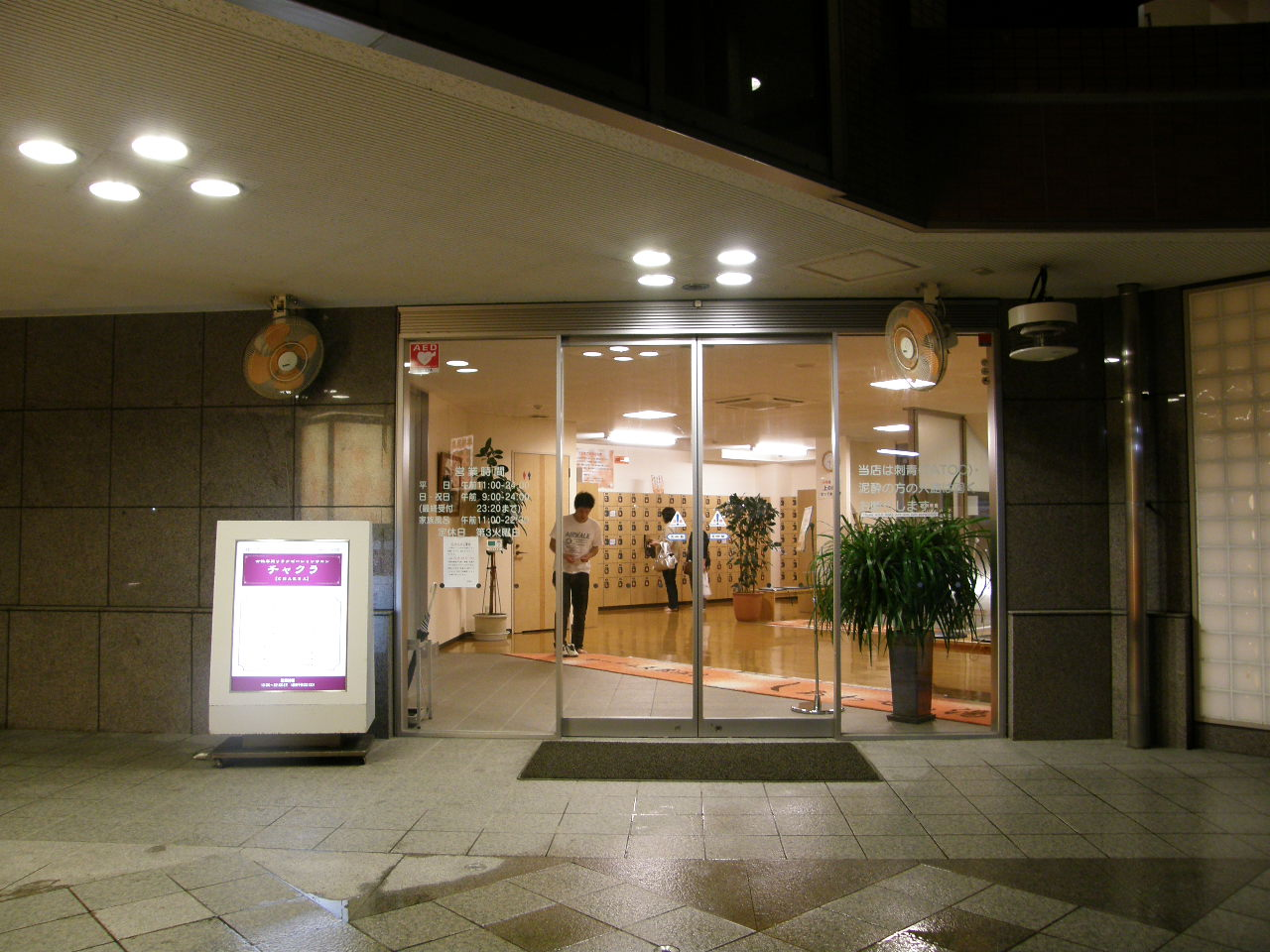 オータム天然温泉しあわせの湯Ⅱ 田上 撮影：松岡明芳